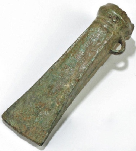 Hache à douille armoricaine type Le Tréhou, soulignée de deux moulures. Elle fait partie du dépôt de Guesman en Le Tréhou où 900 haches à douille ont été trouvées